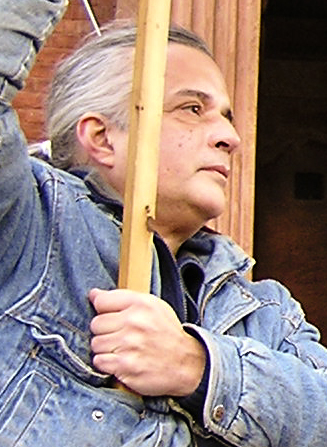 Arnie Lerma